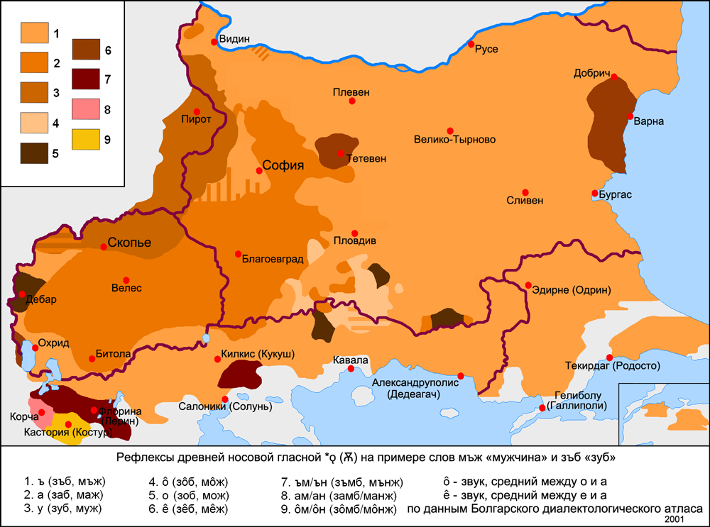 Распространение рефлексов древней носовой гласной Ѫ в болгарско-македонском диалектном ареале согласно данным Болгарского диалектологического атласа 2001 года